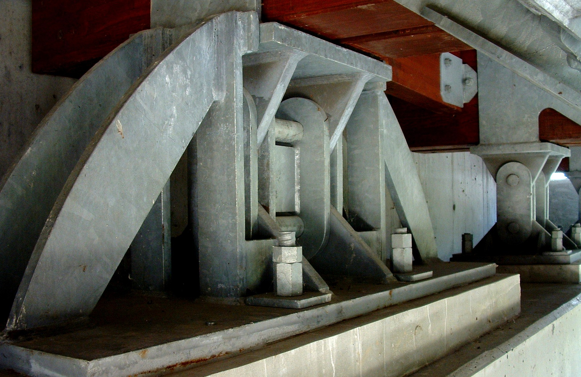 A89 - Pont d'accès à l'aire de Chavanon - Culée - Appareils d'appui